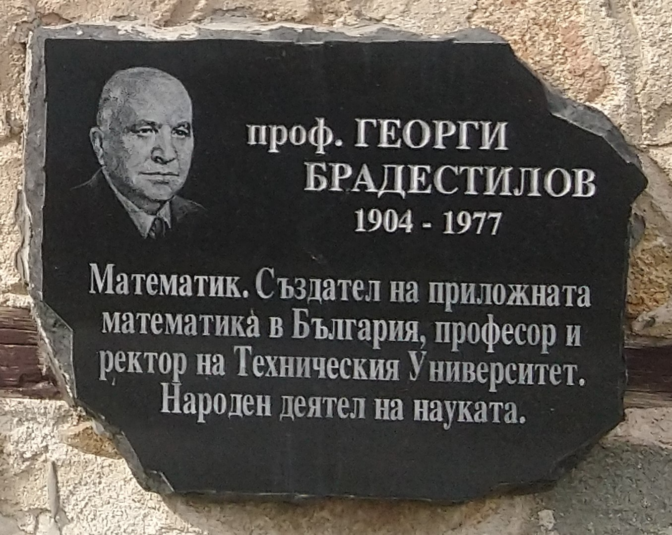 Проф. Георги Брадистилов (1904 - 1977) - плоча в Исторически музей Панагюрище - Надпис: Математик. Създател на приложната математика в България, професор и ректор на Техническия университет. Народен деятел на науката.